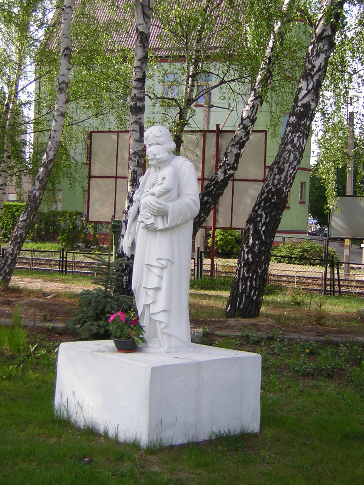 Pomnik św. Józefa w Iławie przy kościele NPNMP.